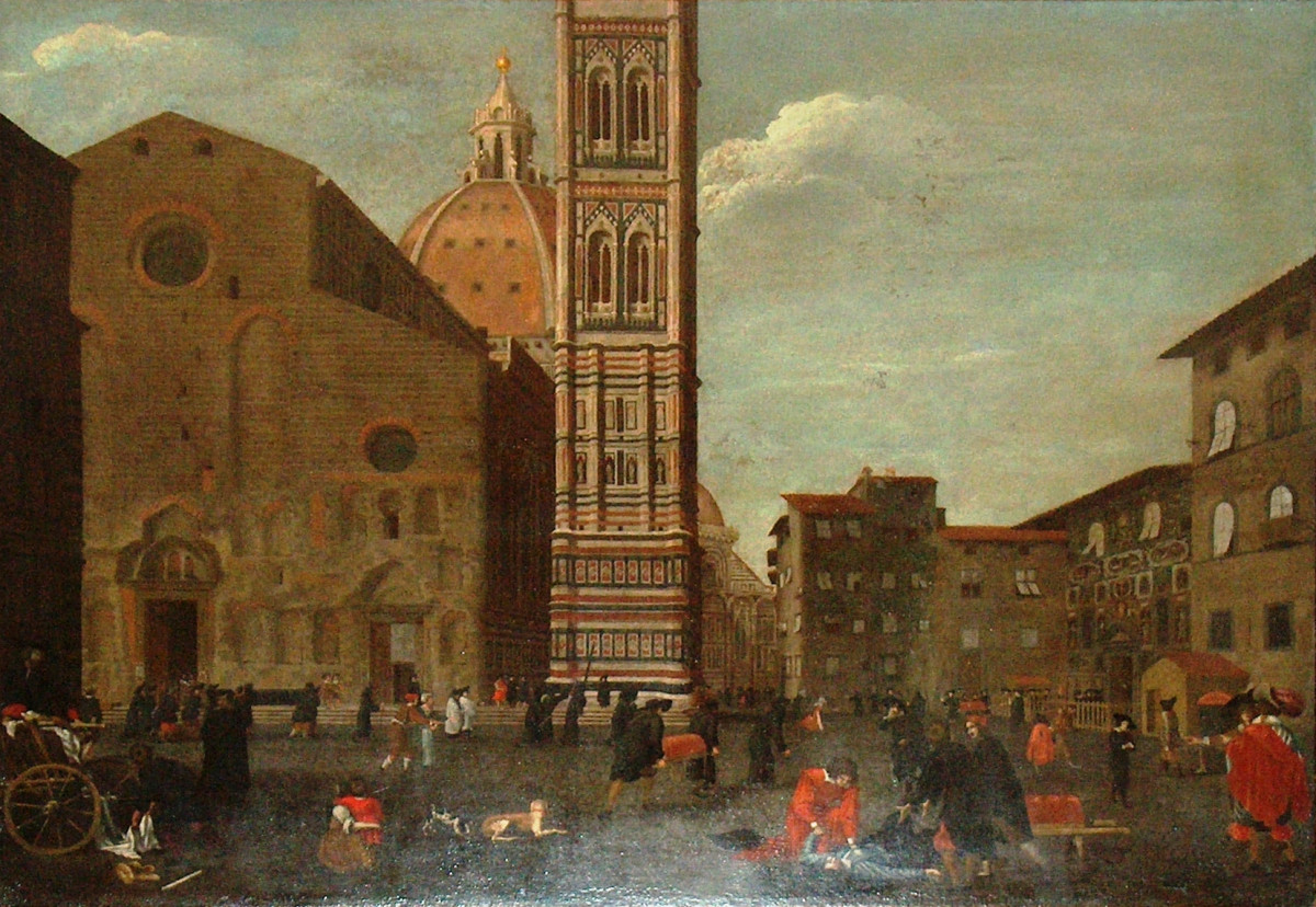 Quadro della peste a Firenze nel 1630